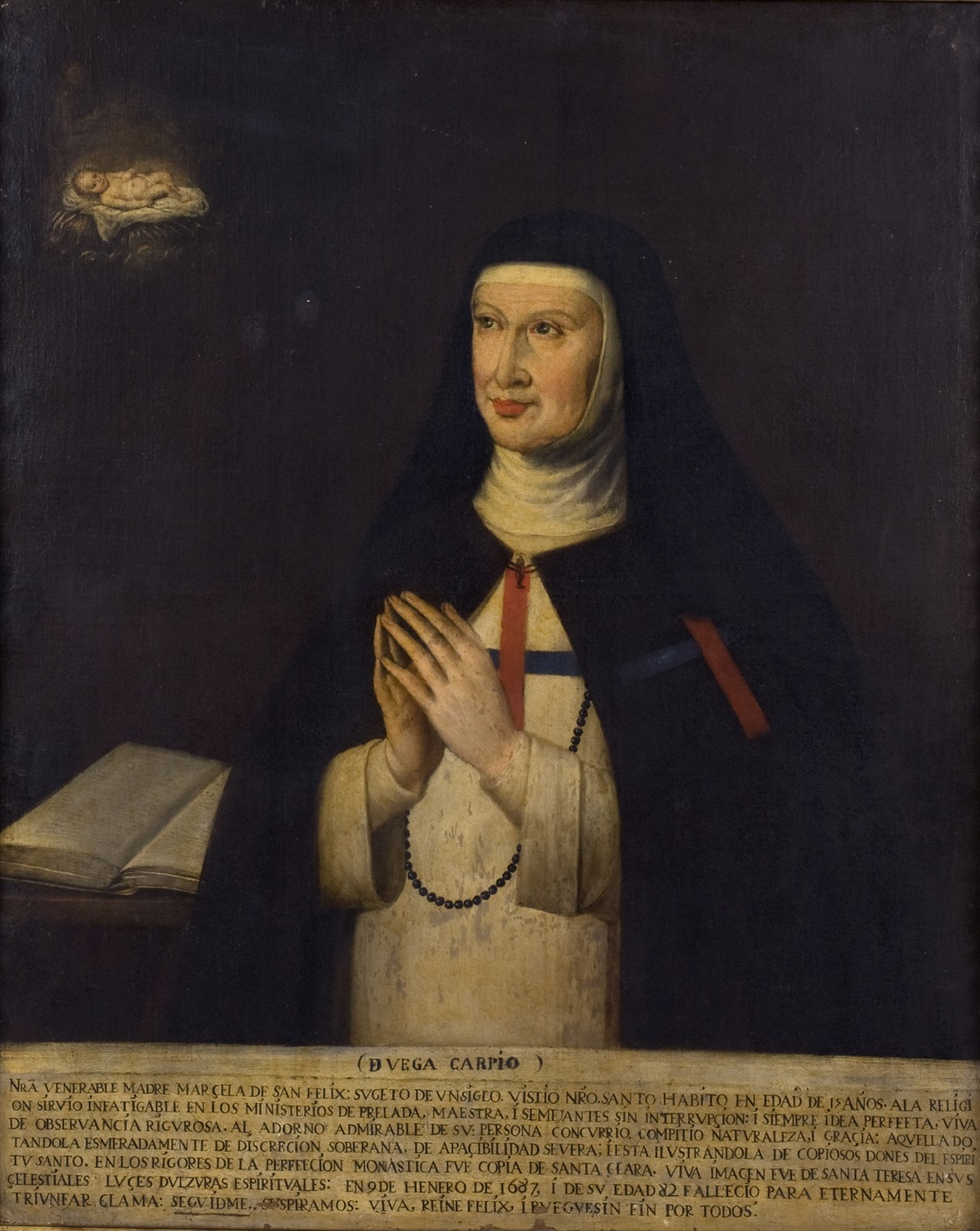 Retrato de Sor Marcela de San Félix (1605-1687), que fue una escritora y monja trinitaria y era hija del célebre dramaturgo Félix Lope de Vega y Carpio. El retrato se encuentra en la Casa-Museo de Lope de Vega, y Sor Marcela aparece vestida con el hábito de la Orden de las Trinitarias, y en el pecho y en su hombro izquierdo aparece la cruz azul y roja de los Trinitarios. Las manos de la retratada aparecen juntas y en posición orante, mientras que su vista está puesta en el Niño Jesús, que se halla en la parte superior izquierda y descansando sobre una sabanilla colocada sobre un lecho de paja.